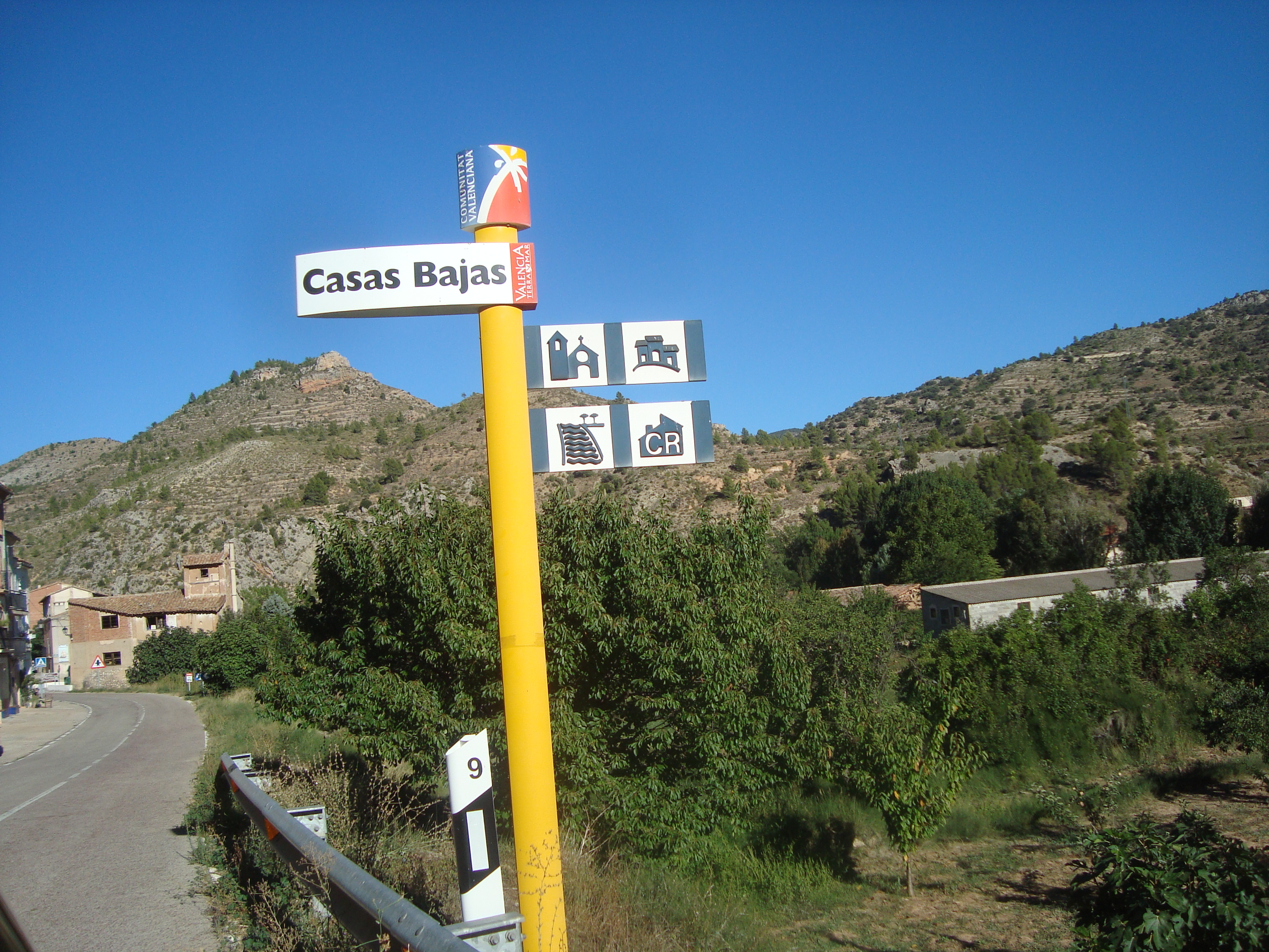 Casas Bajas es un municipio de la Comunidad Valenciana, España. Perteneciente a la provincia de Valencia, en la comarca del Rincón de Ademuz.